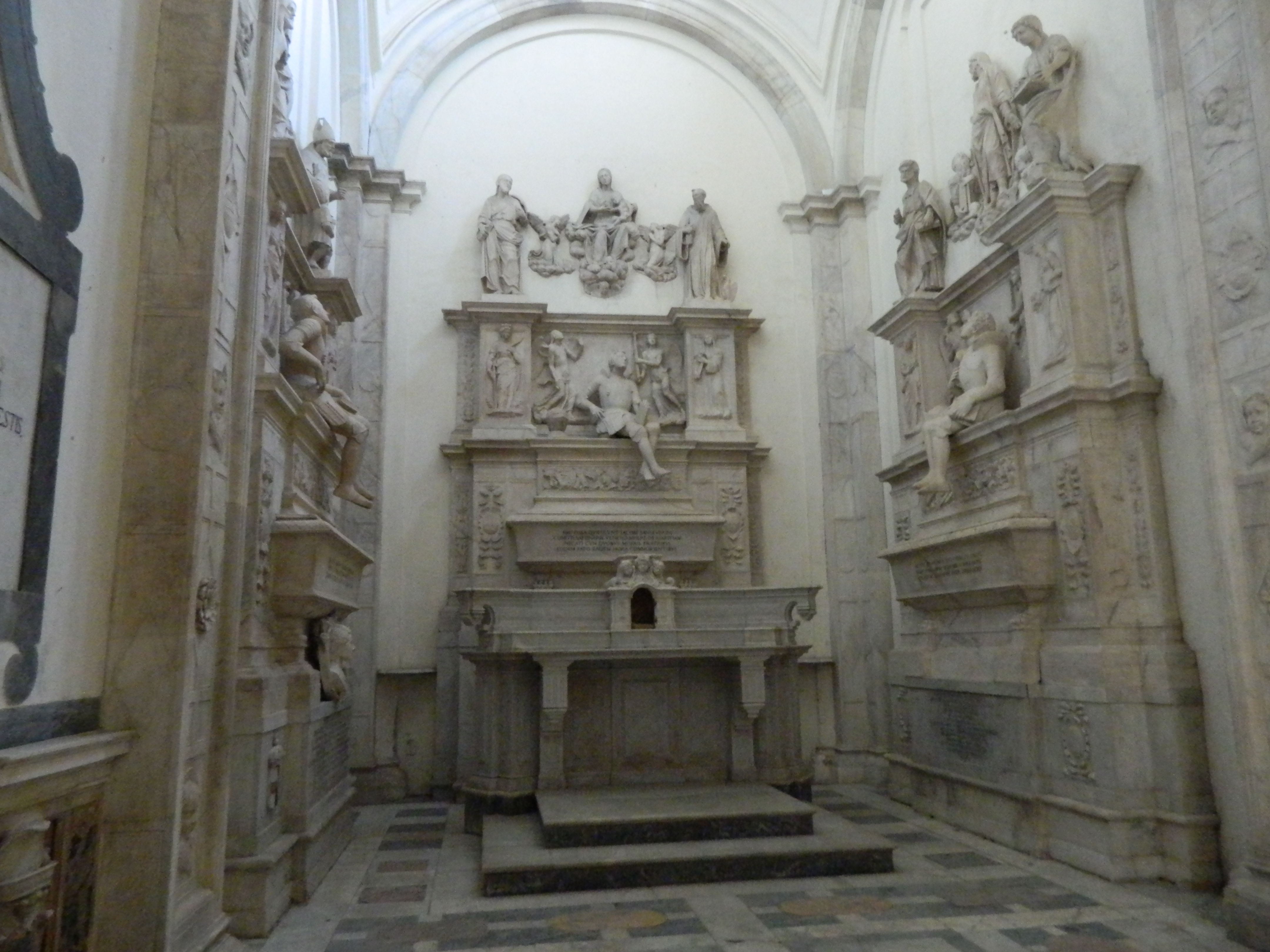 Cappella Sanseverino - Chiesa dei santi Severino e Sossio di Napoli